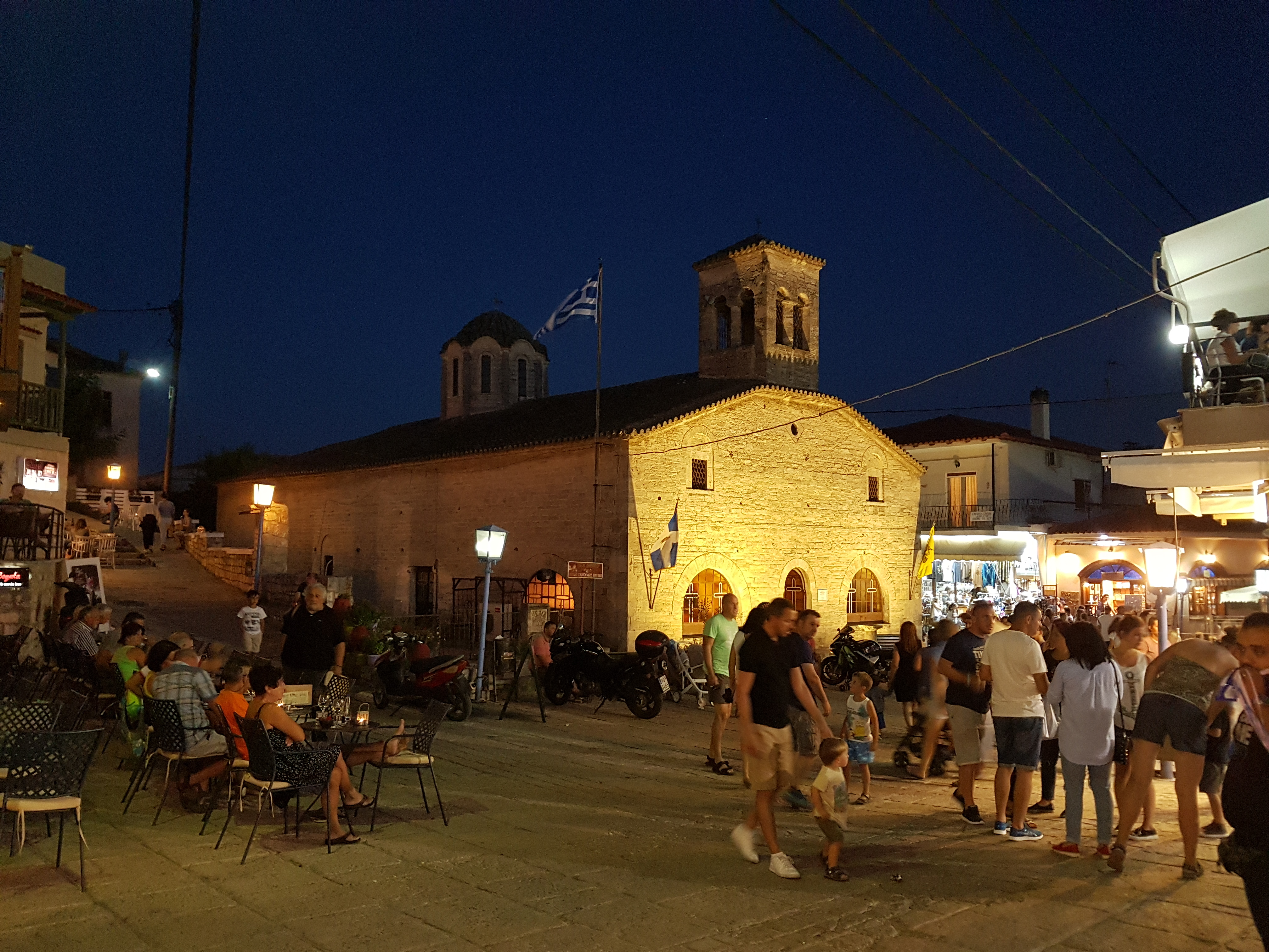 Άγιος Δημήτριος, Άφυτος Χαλκιδικής